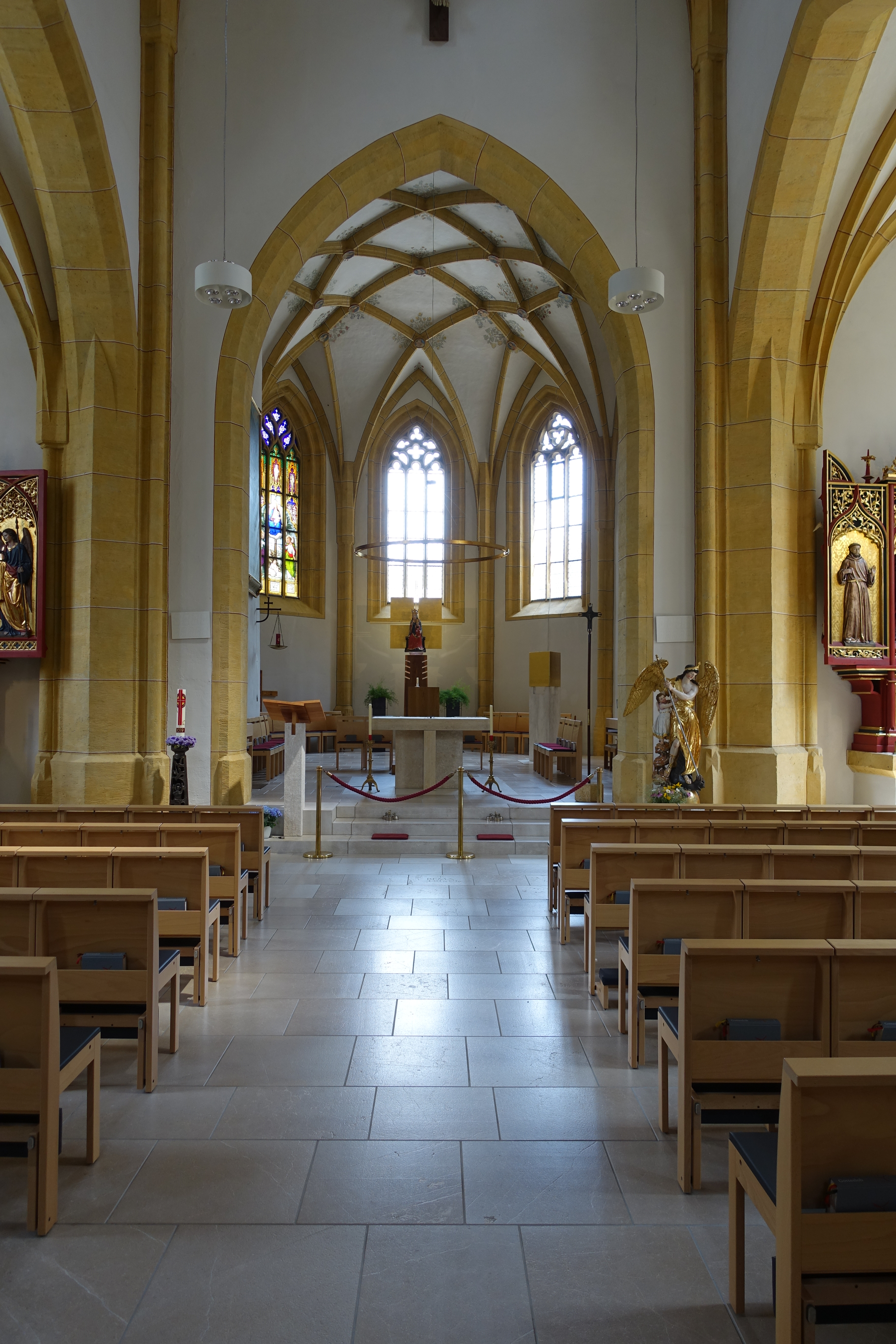 Landeck, Tirol, Österreich. Katholische Pfarrkirche Mariä Himmelfahrt, Mittelschiff mit Chorraum